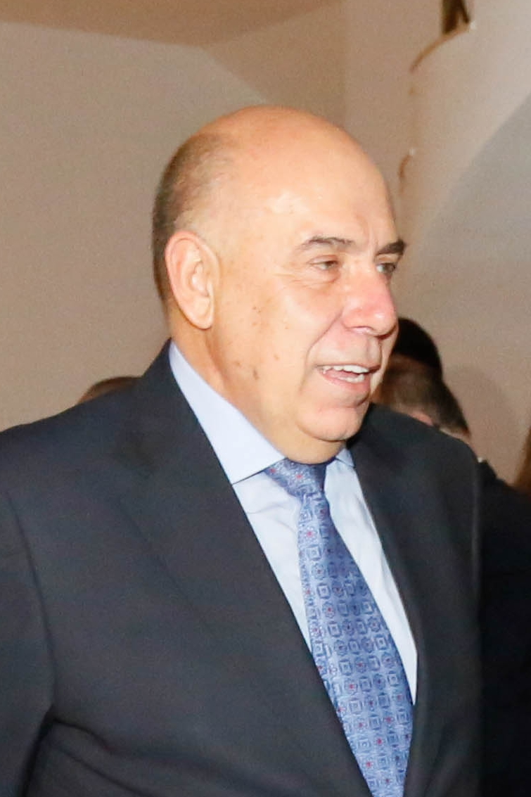 Vice-presidente Michel Temer prestigia a celebração de 15 anos da Rede TV. (versão recortada no Amilcare Dallevo Jr.